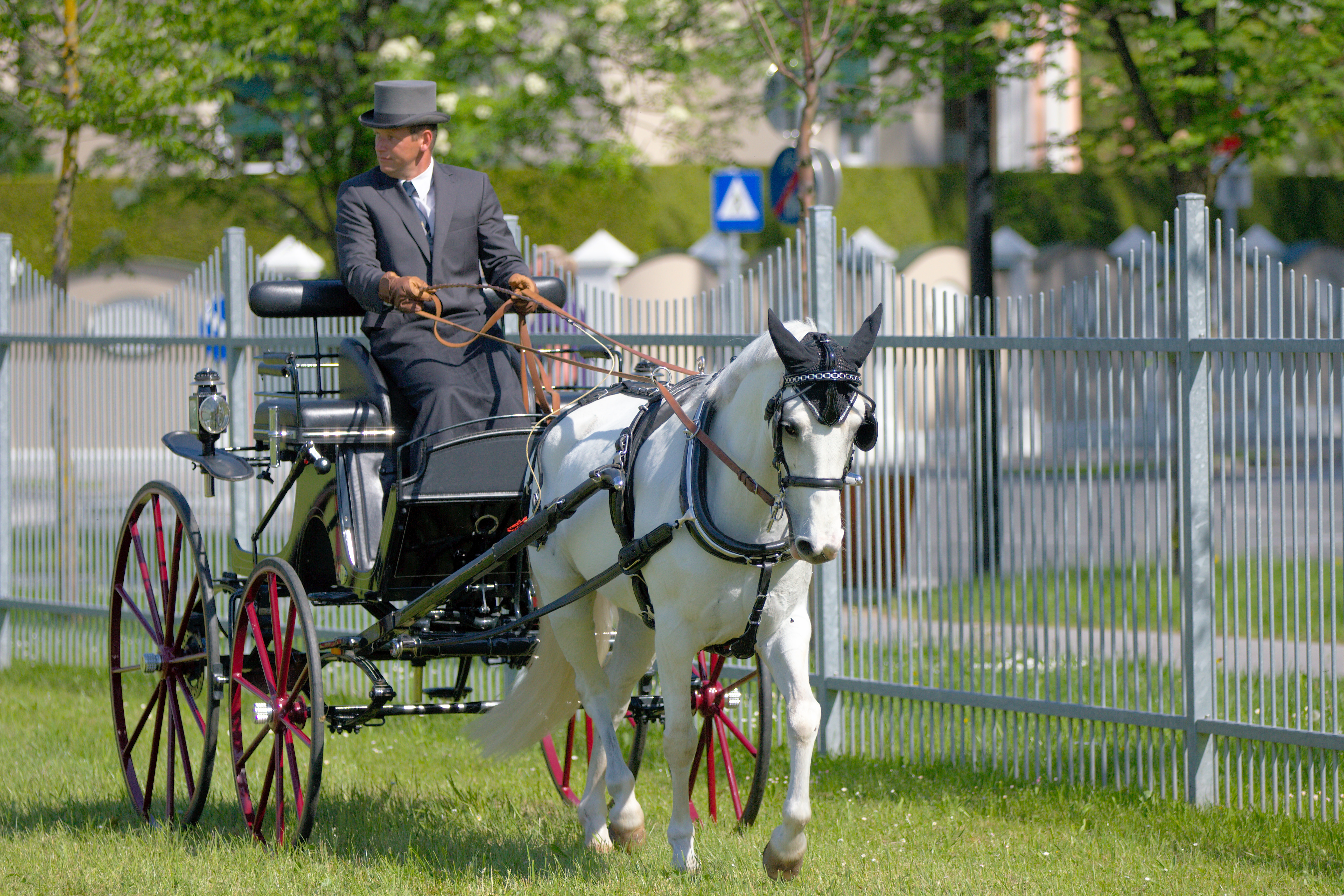 Horse driving at Stiegl brewery in Salzburg